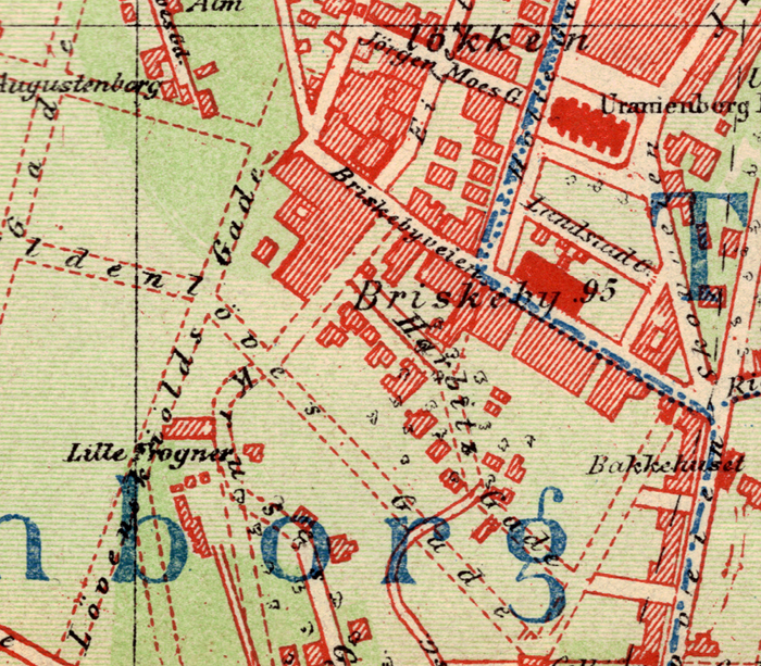 Briskeby, Oslo.